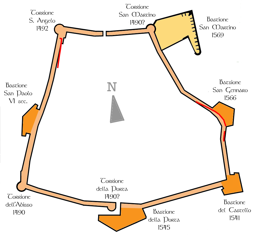 fortificazioni-mura-Bisceglie